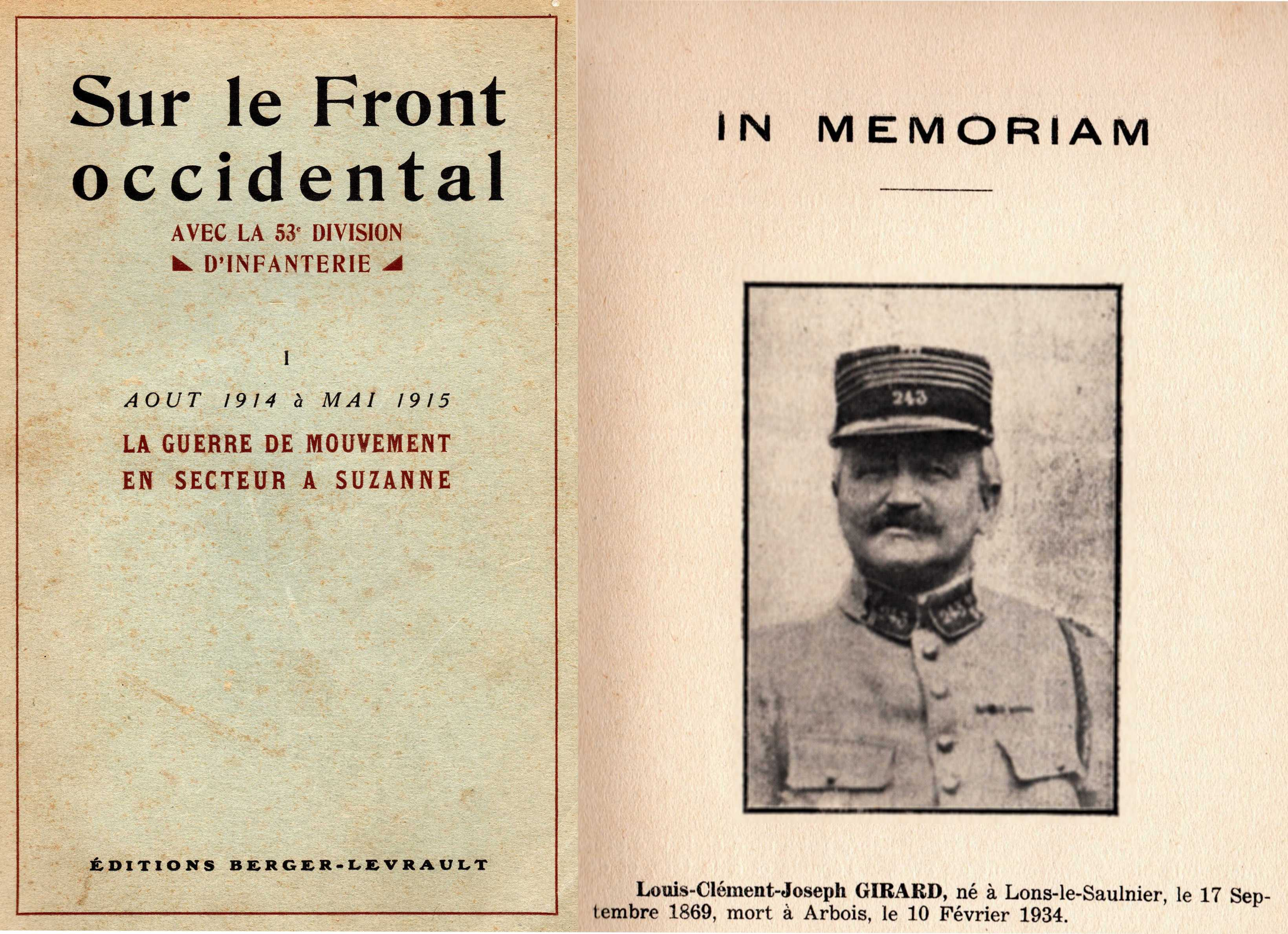 GIRARD Louis Clément Joseph, "Sur le front occidental avec la 53e division d'infanterie." Ouvrage en quatre volumes. Paris - Berger-Levrault ed., Besançon - Sequana ed, Paris - Brodart et Taupin ed.,1932-1938.